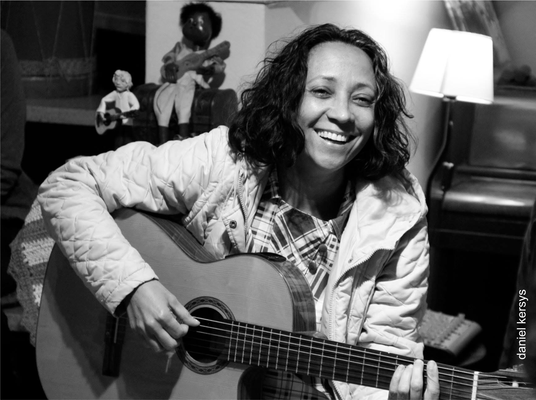 Socorro Lira e seu violão